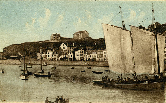 Lithographie du port de Granville